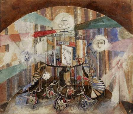 Якулов Г.Б. Эскиз декорации к оперетте Ж.Оффенбаха. Экспериментальный театр, Москва. 1924